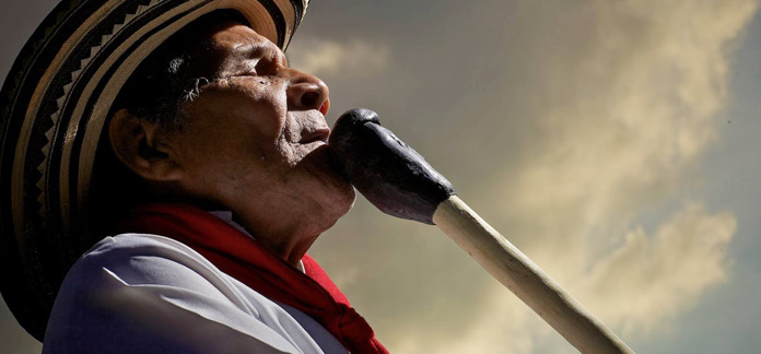 gaitero